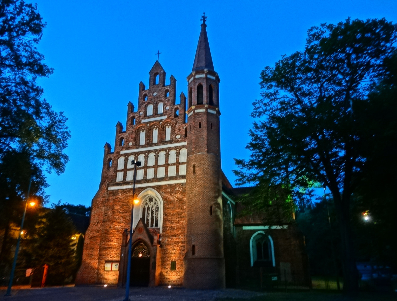 Kościół pobernardyński p.w. Najświętszej Maryi Panny Królowej Pokoju, zbud. 1552-1557, do 1830 kościół klasztorny bernardynów bydgoskich, od 1866 r. garnizonowy